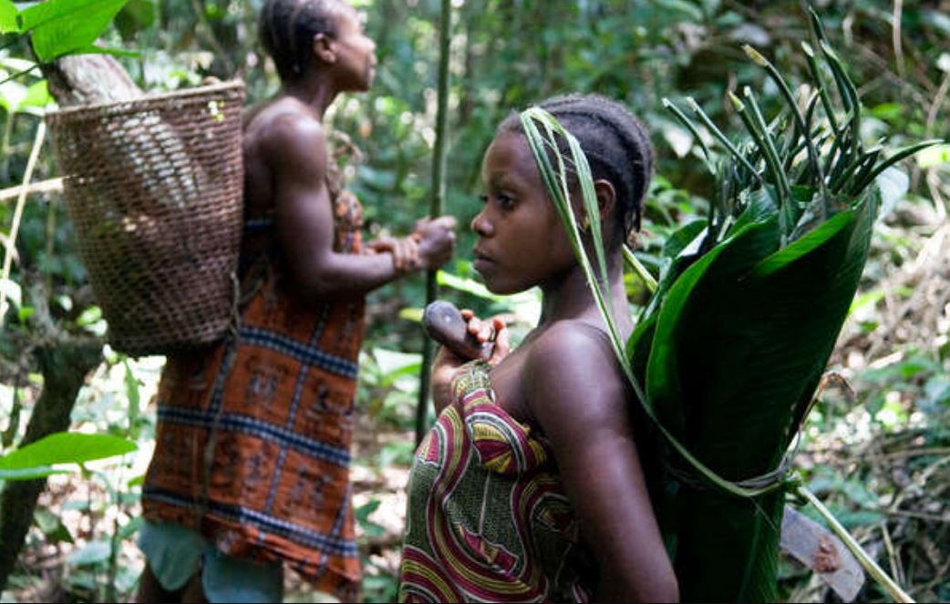 Le terme de peuples autochtones en RDC fait référence aux peuples Mbuti, Baka et Batwa qui considèrent leur appellation générique de «pygmées» comme dérogatoire et discriminatoire. This photo has been taken in the country: Unknown